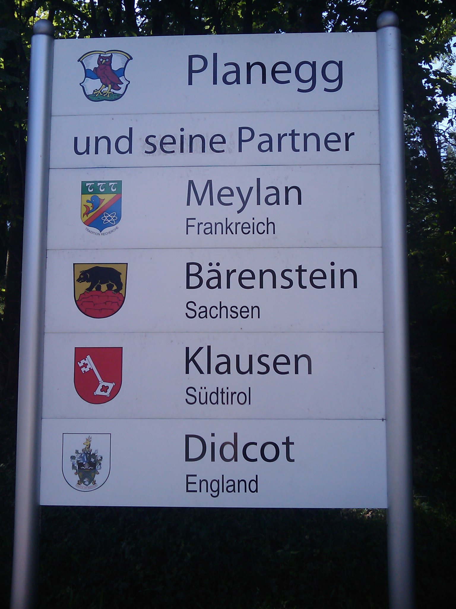 Schild mit den Partnerstädten Planeggs